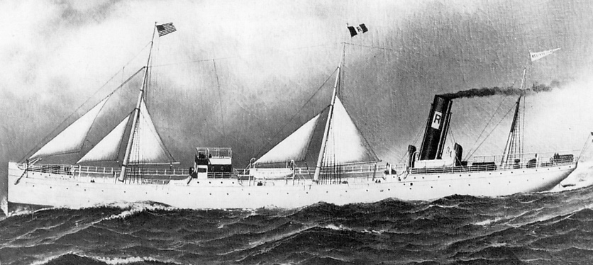 Tankkdampfer Deutschland, der erste in Deutschland gebaute Seetanker